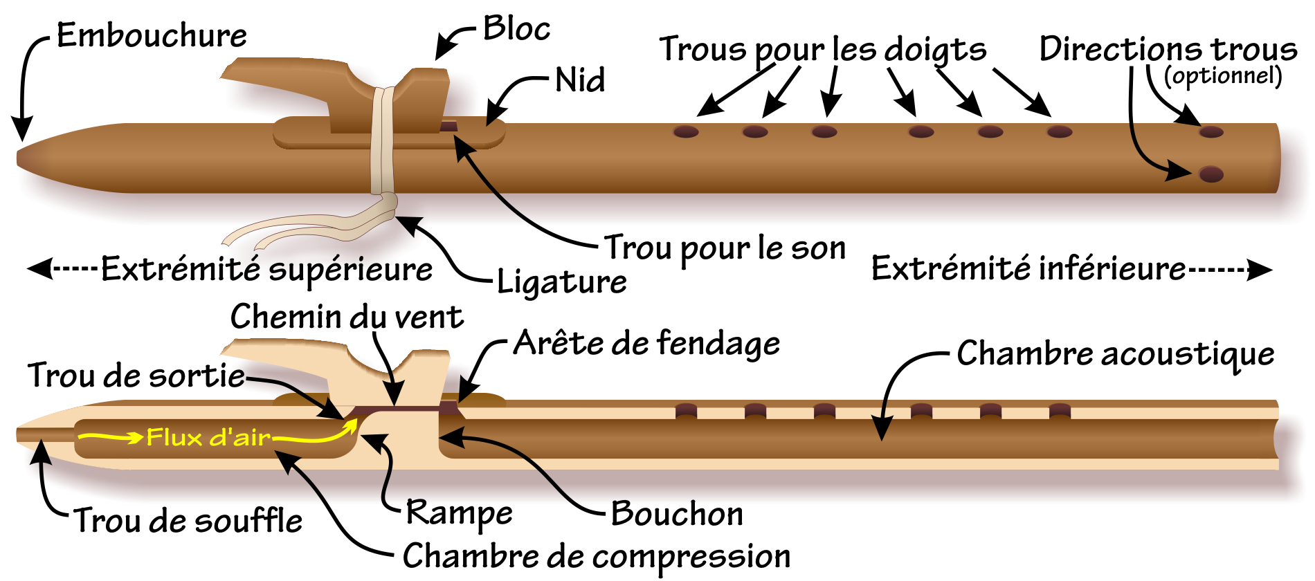 Anatomy of a Native American flute, with French-language tags.